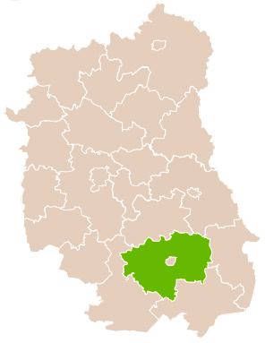 Map of Zamość county, Lublin voivodship Mapa powiatu zamojskiego, województwo lubelskie